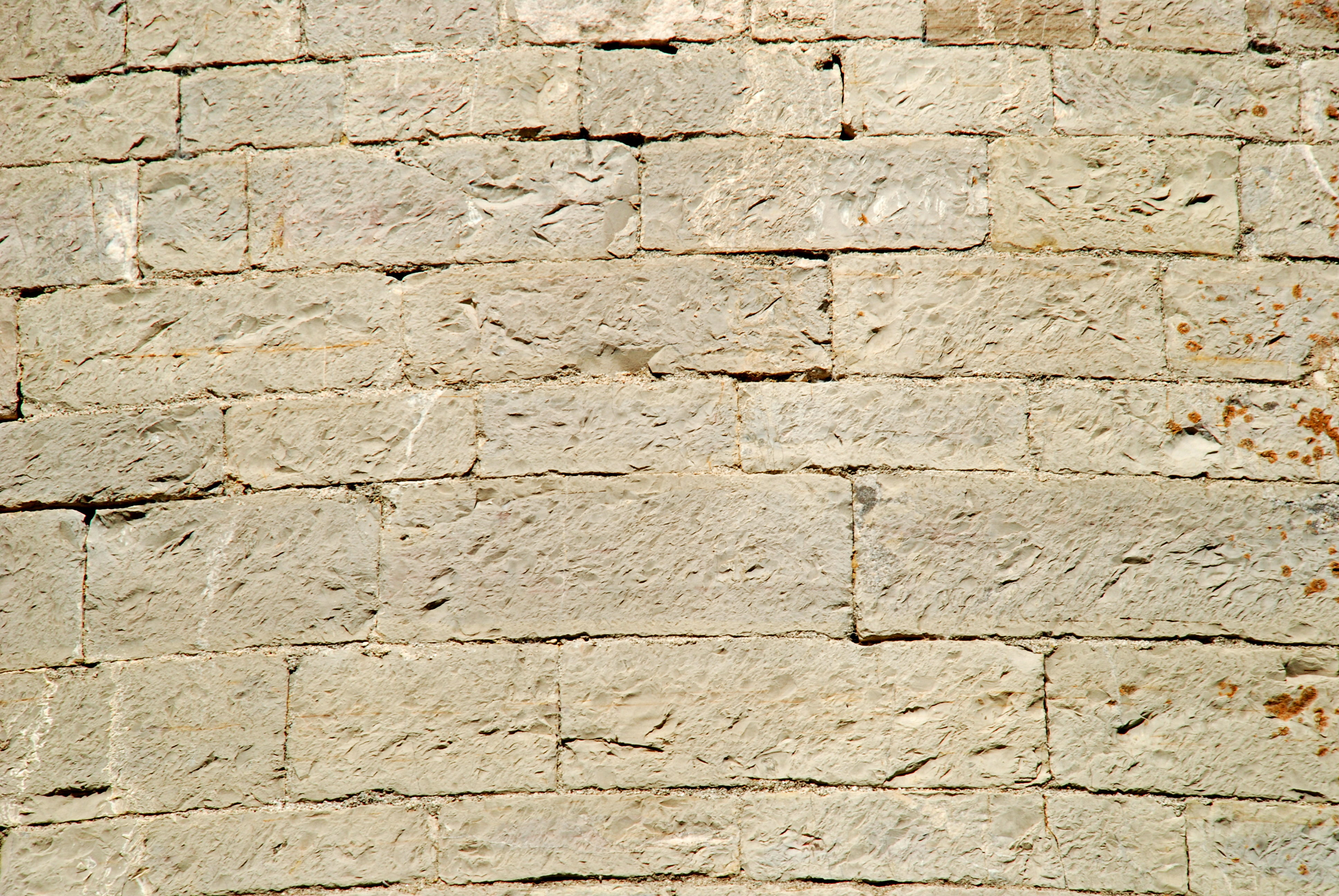 France - Gard - Église Saint-Baudile de Tornac - appareil alterné du chevet